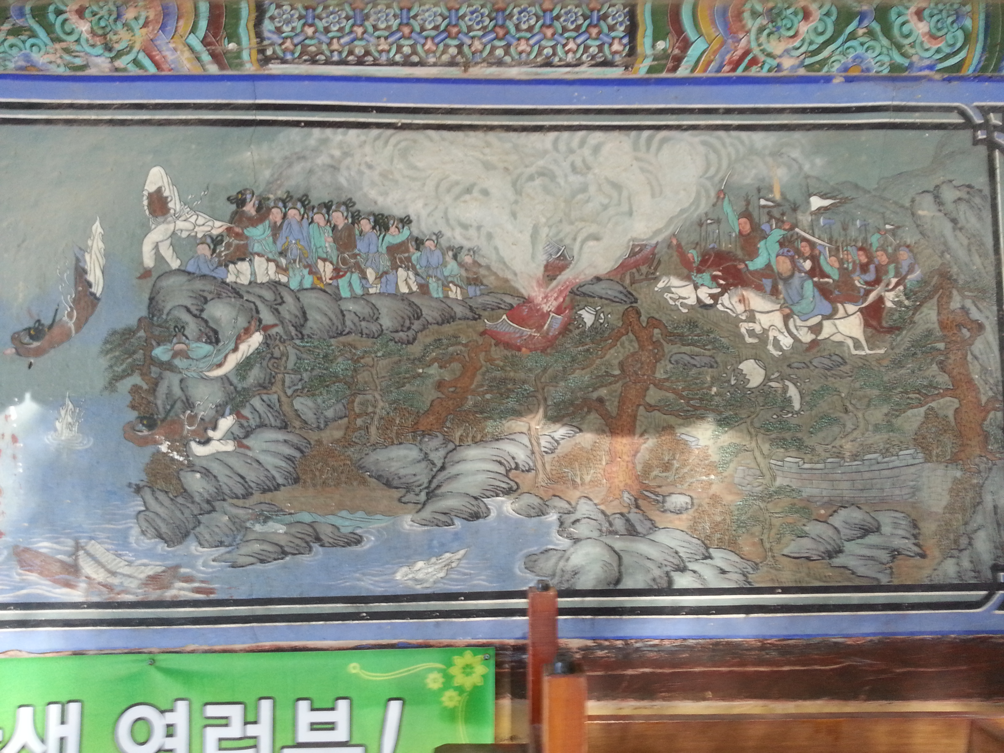 Ein Gemälde in Nähe des Nakwaam-Rock berichtet von der Legende der "fallenden Blüten".